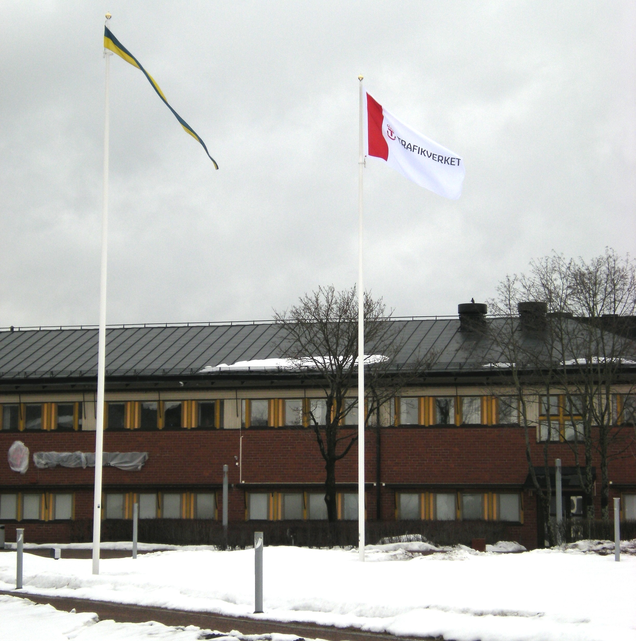 Trafikverkets huvudkontor och flagga